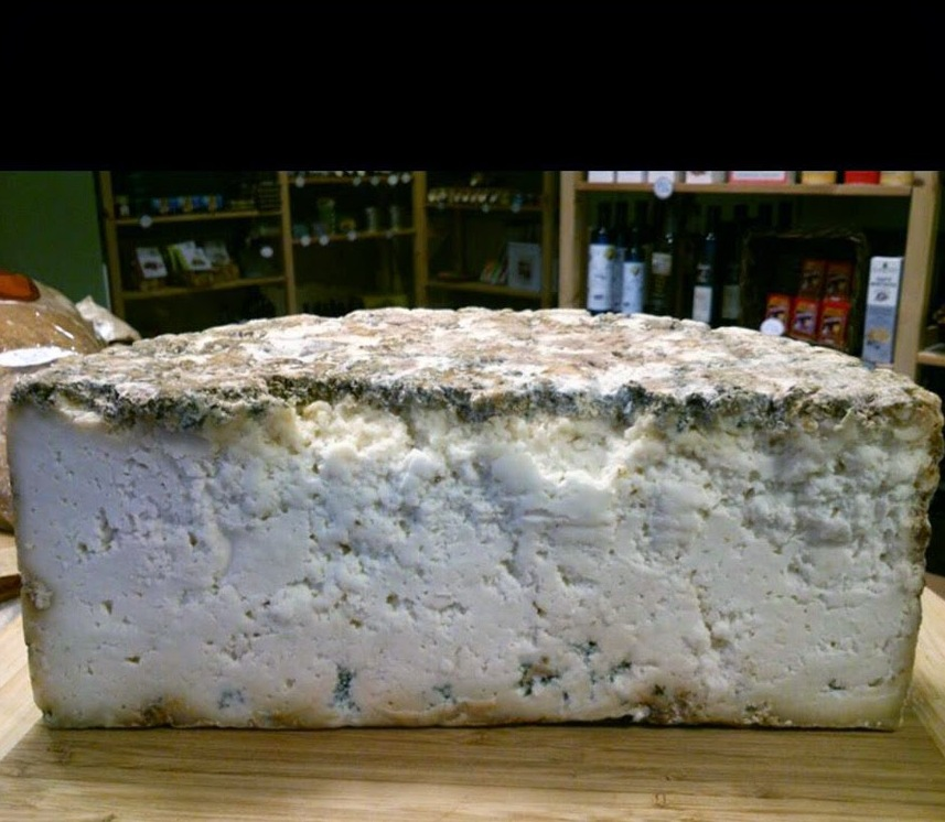 Queso Cueva de Pregondón